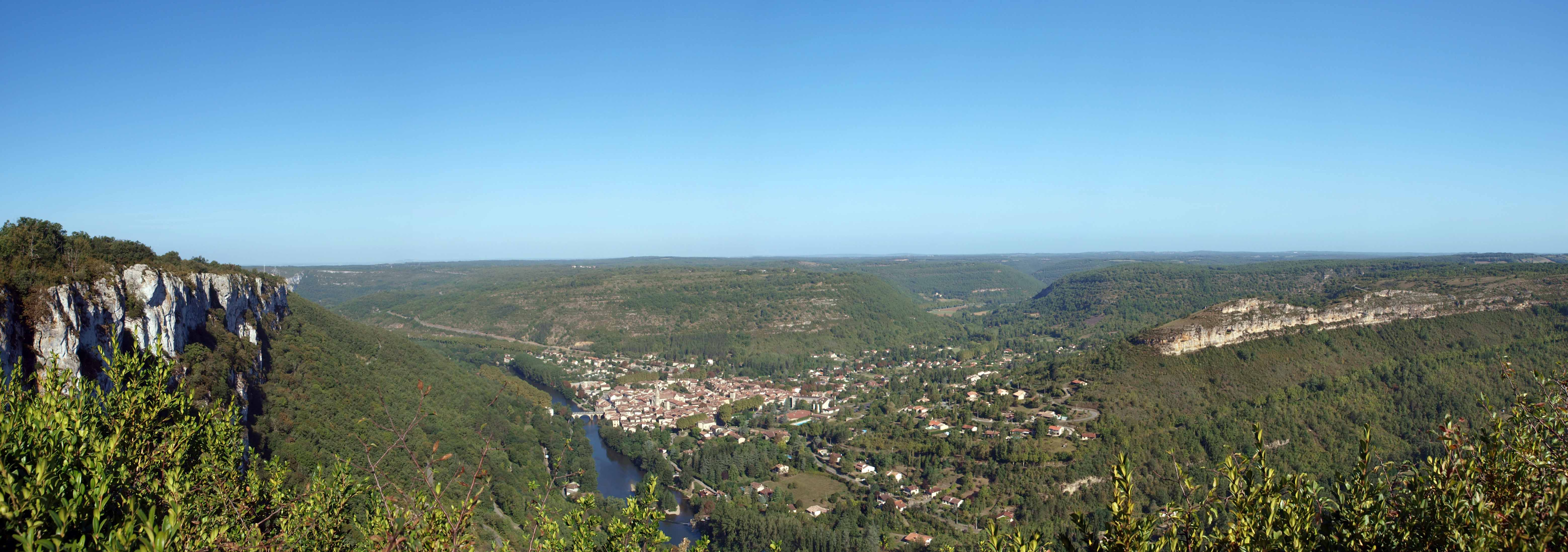 Saint Antonin Noble Val - Vue panoramique depuis le beldère du roc d'Anglars